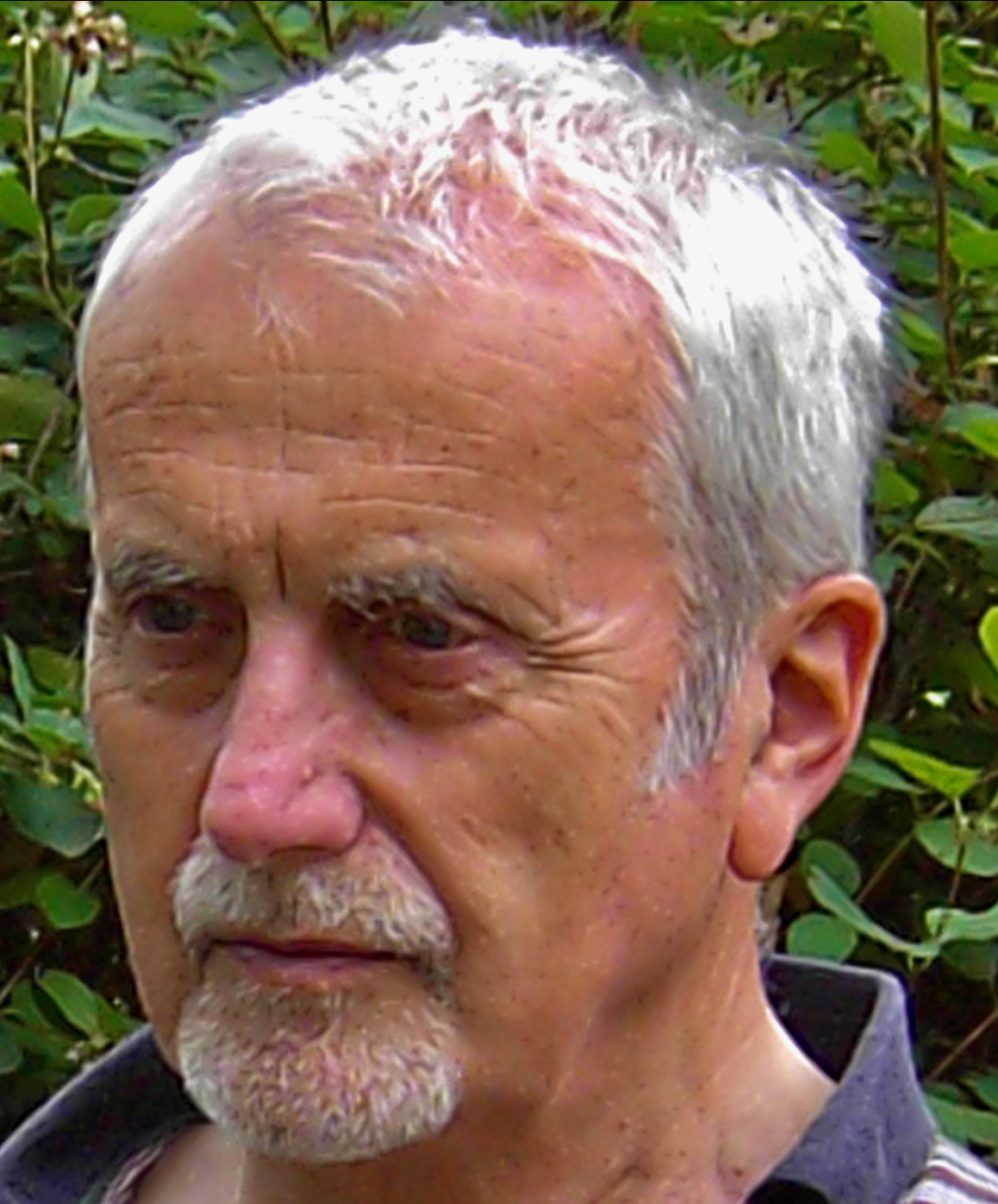 Walek Neumann an der Wittig (Isergebirge)